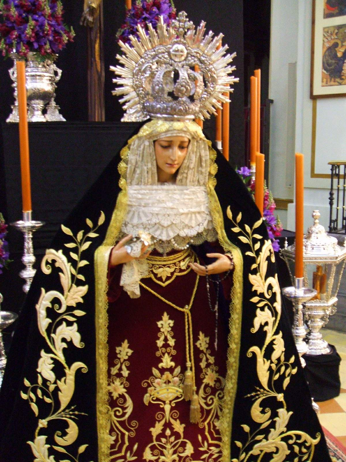 Iglesia de la Merced (Jaén)